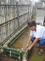 Construyendo un huerto urbano.